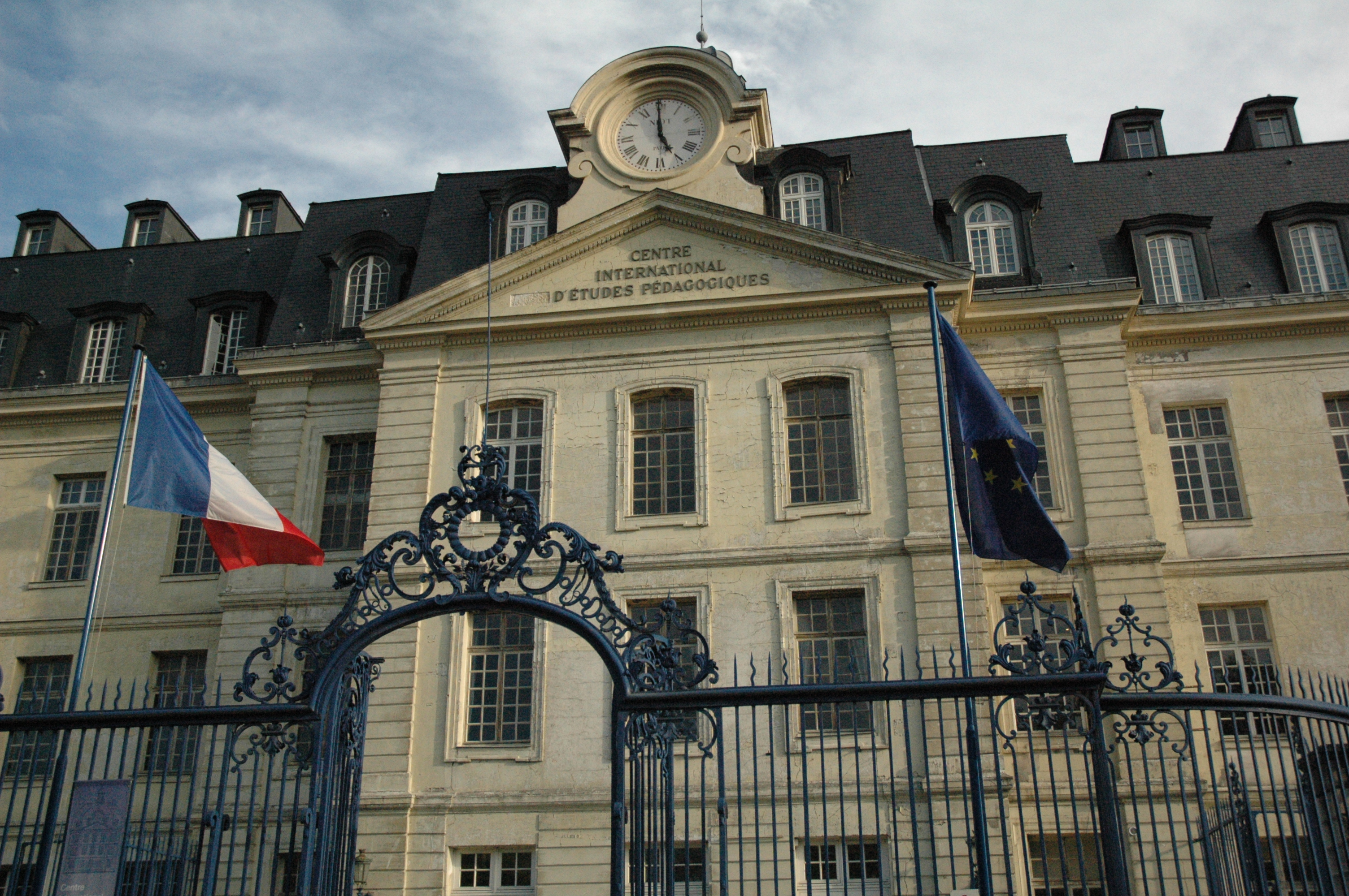 Façade du CIEP, ancienne Manufacture royale de porcelaine de Sèvres .